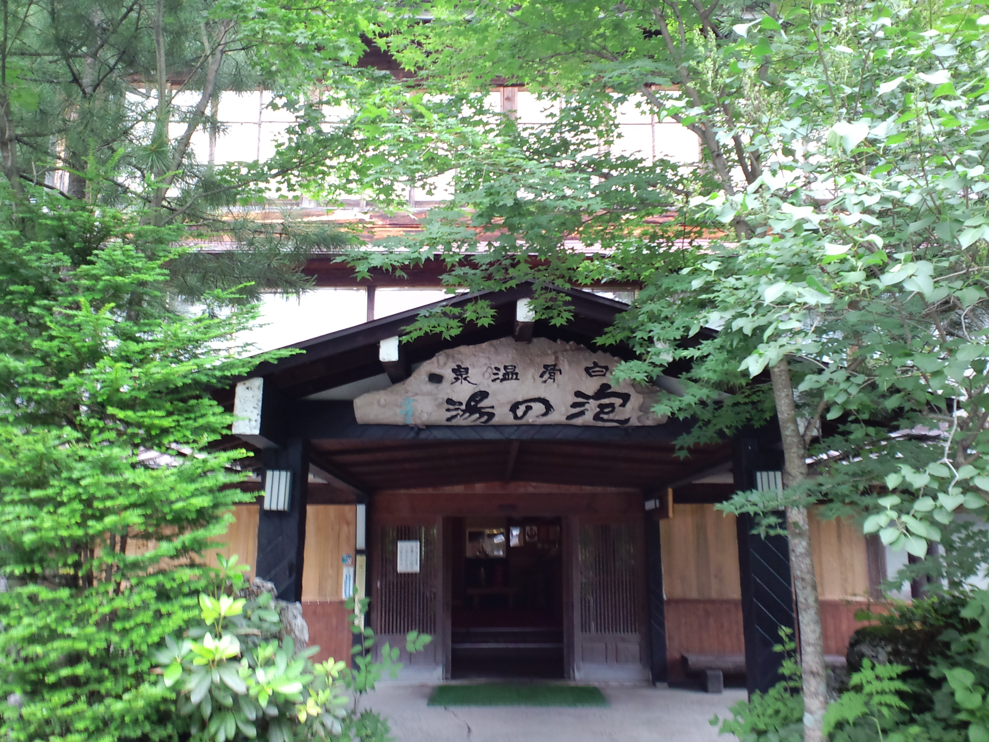 泡の湯 Awanoyu